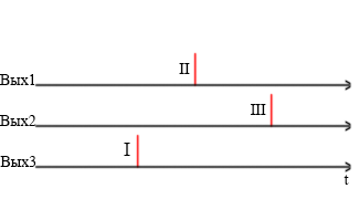 Представление информации в импульсных нейросетях: порядковое.